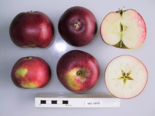 Red Devil